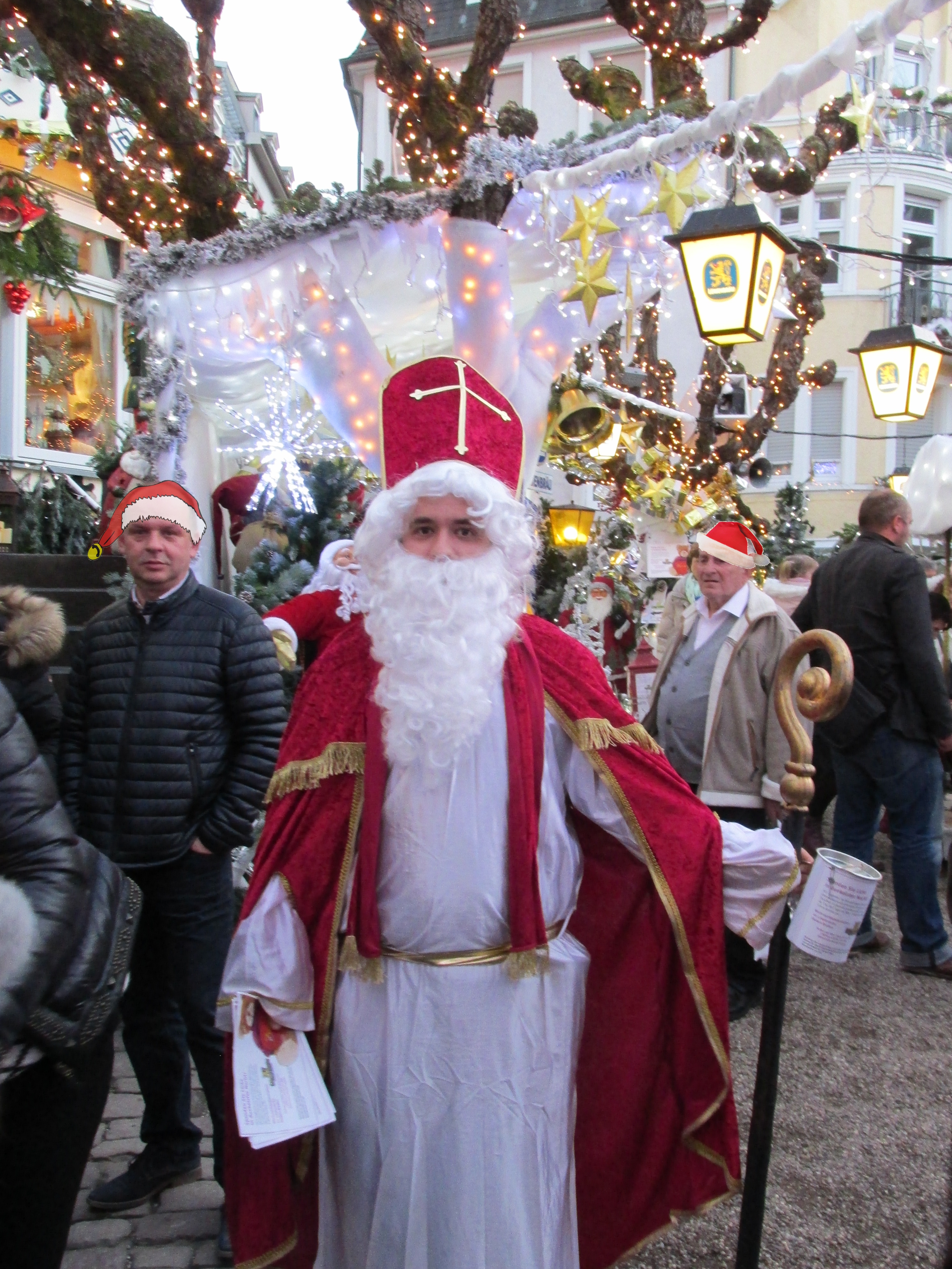 Weihnachten in Baden-Baden